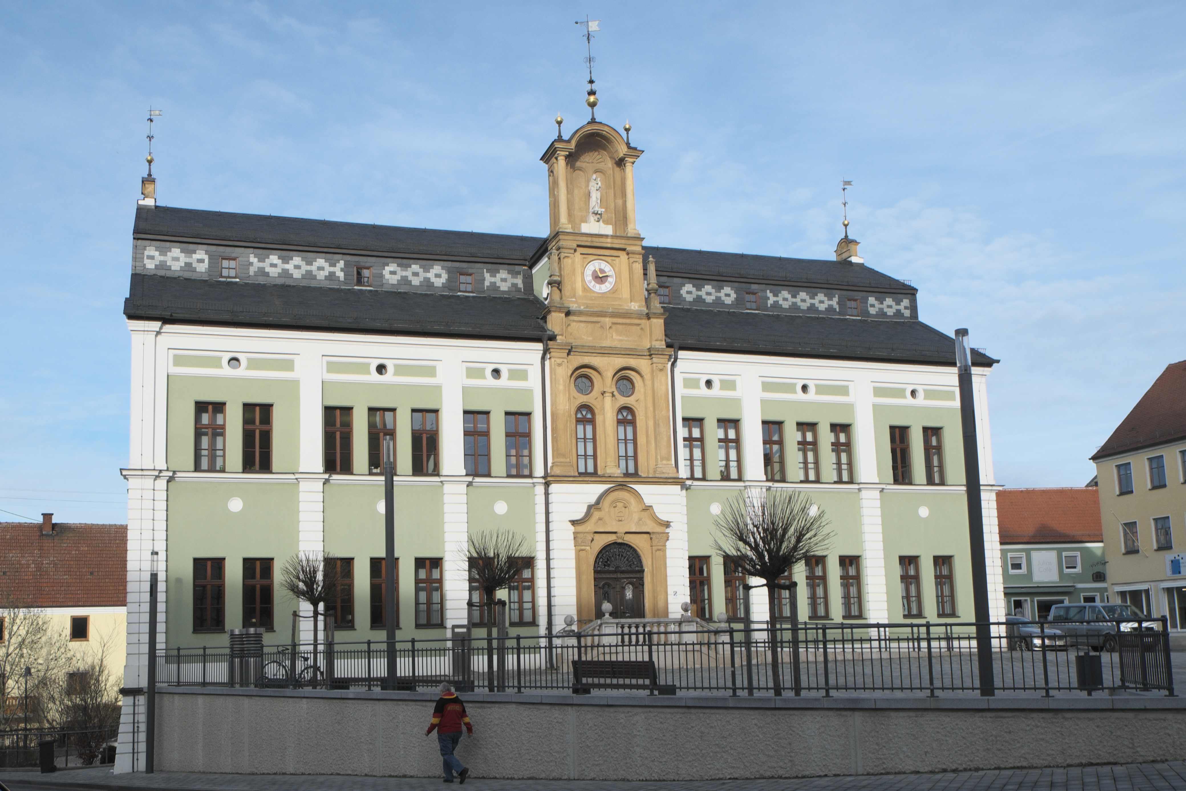 Rathaus in Wolnzach im oberbayerischen Landkreis Pfaffenhofen an der Ilm (Bayern/Deutschland)